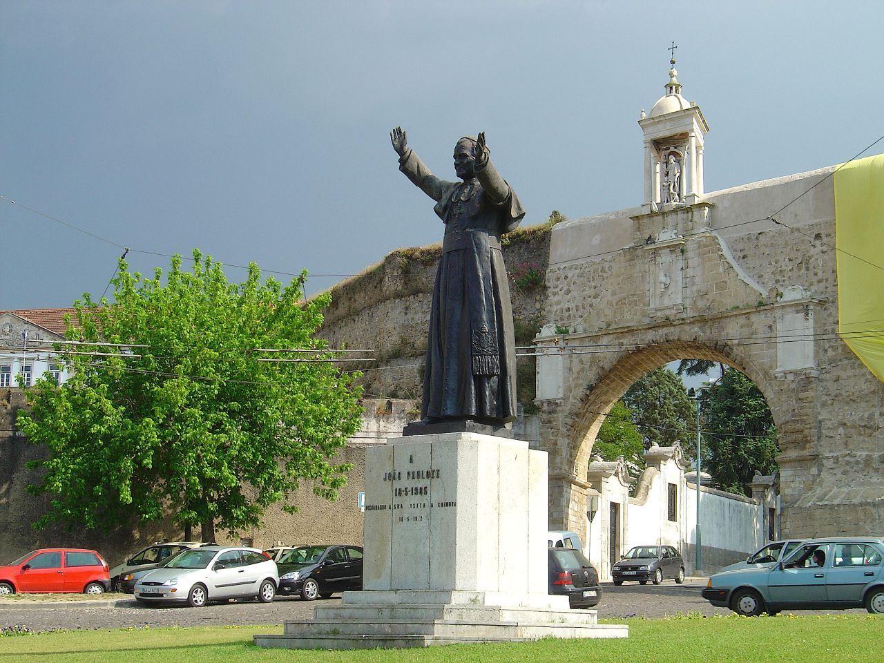 Praça João Paulo II - Coimbra - Portugal